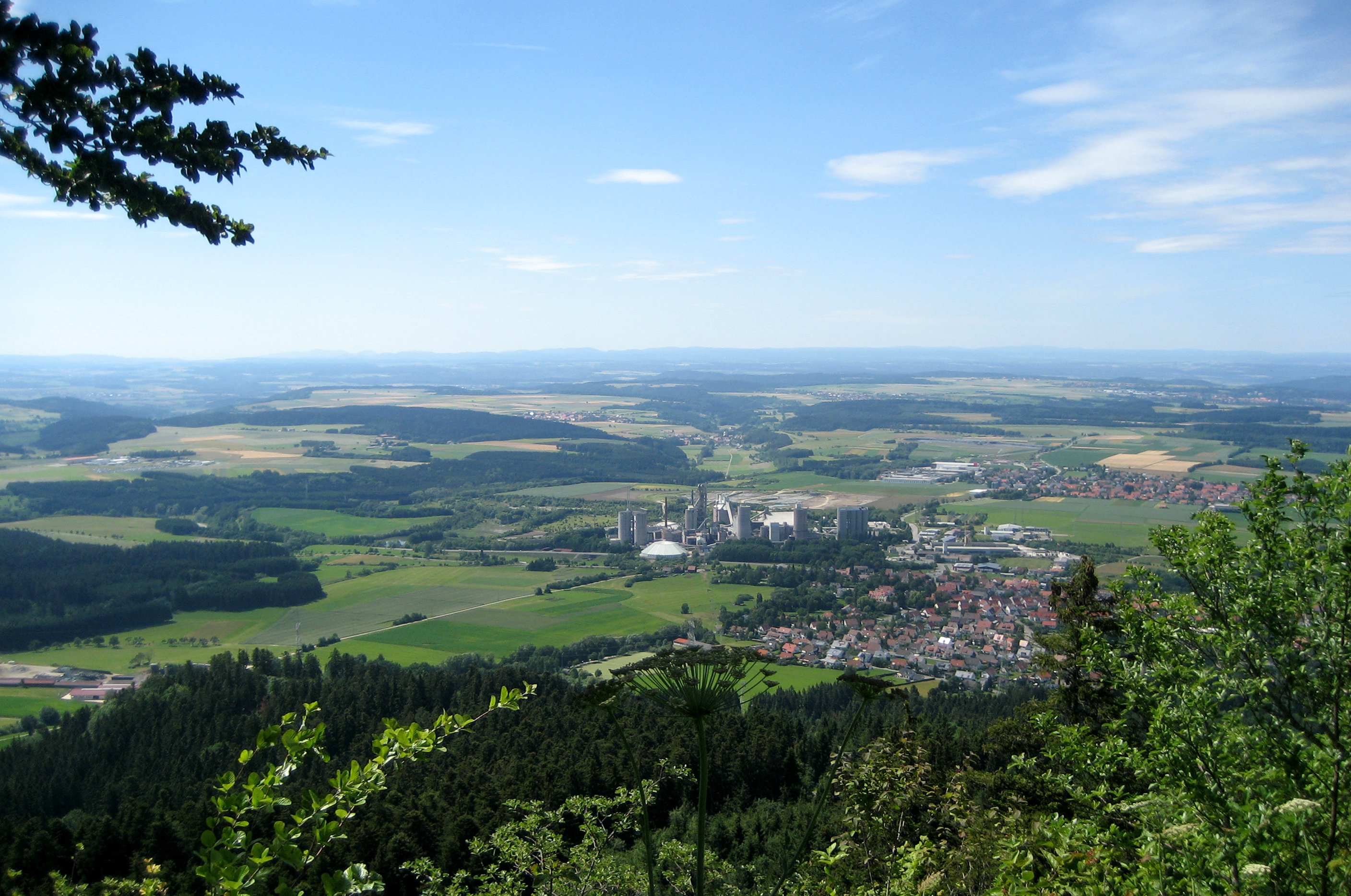 Nordwestteil des Kleinen Heubergs vom Plettenberg